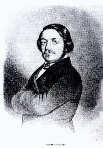 Portrait de Konrad Max Kunz, compositeur et chef de chœur bavarois.